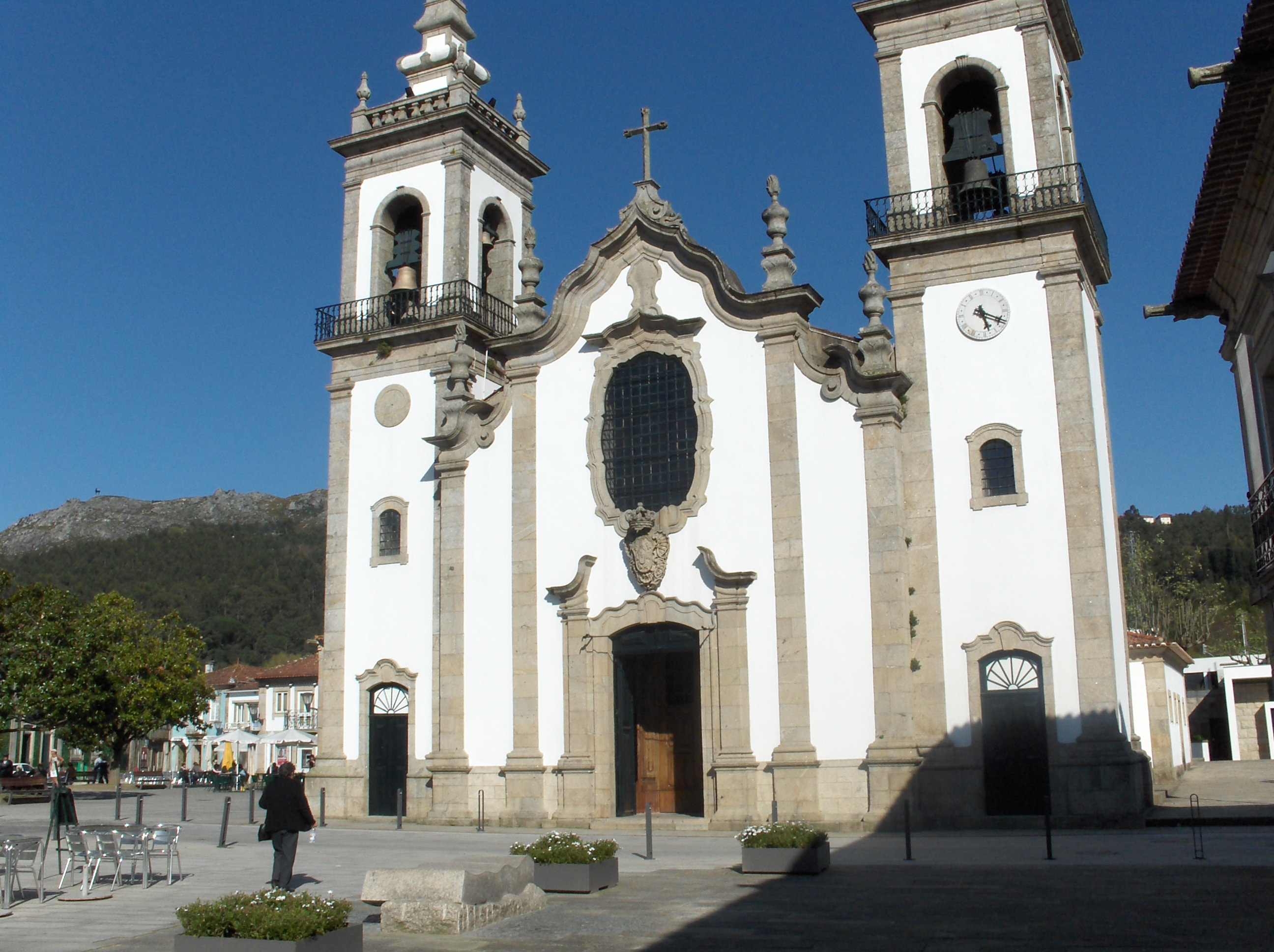 Igreja de Vila Nova de Cerveira